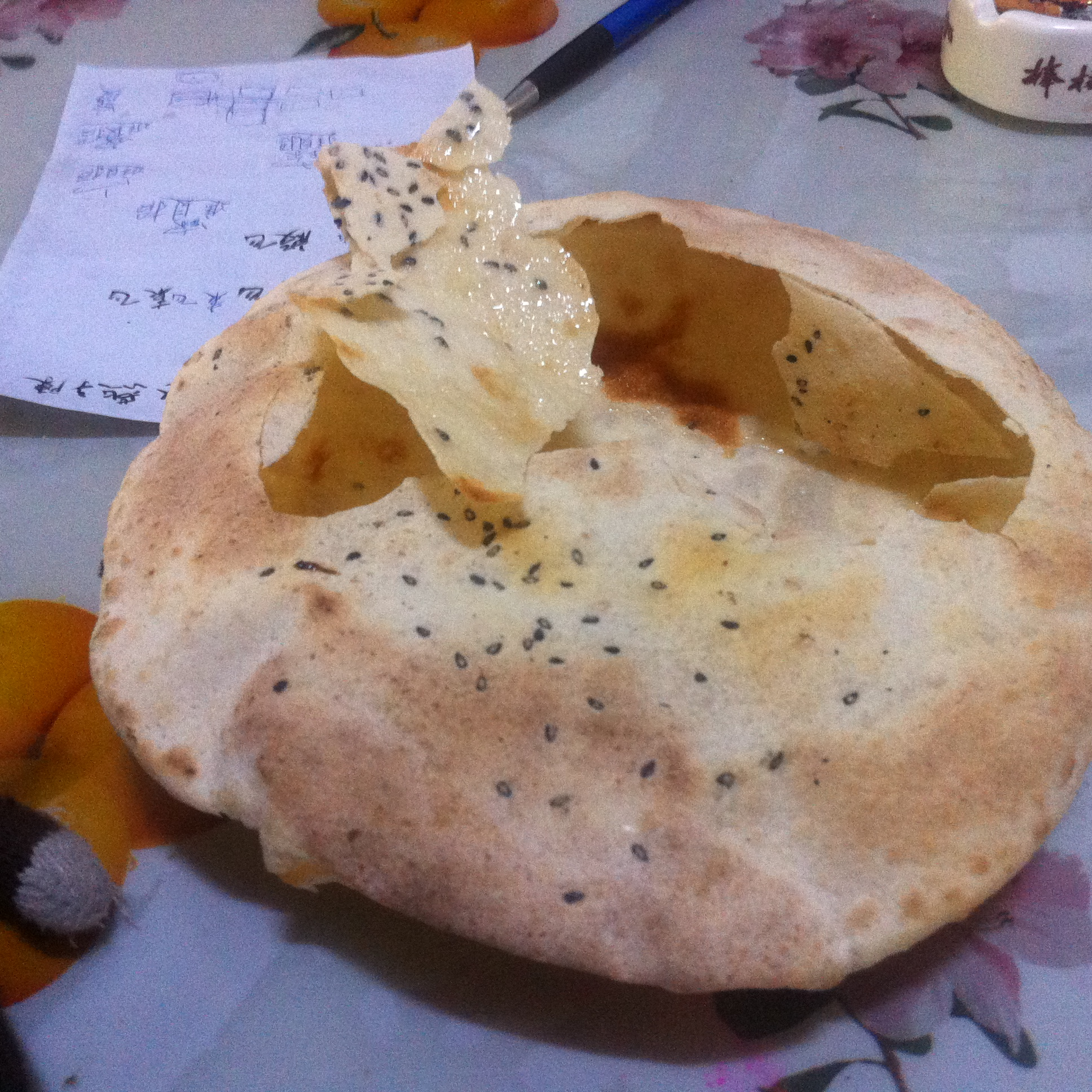 於旅順街頭購得之糖鼓火燒